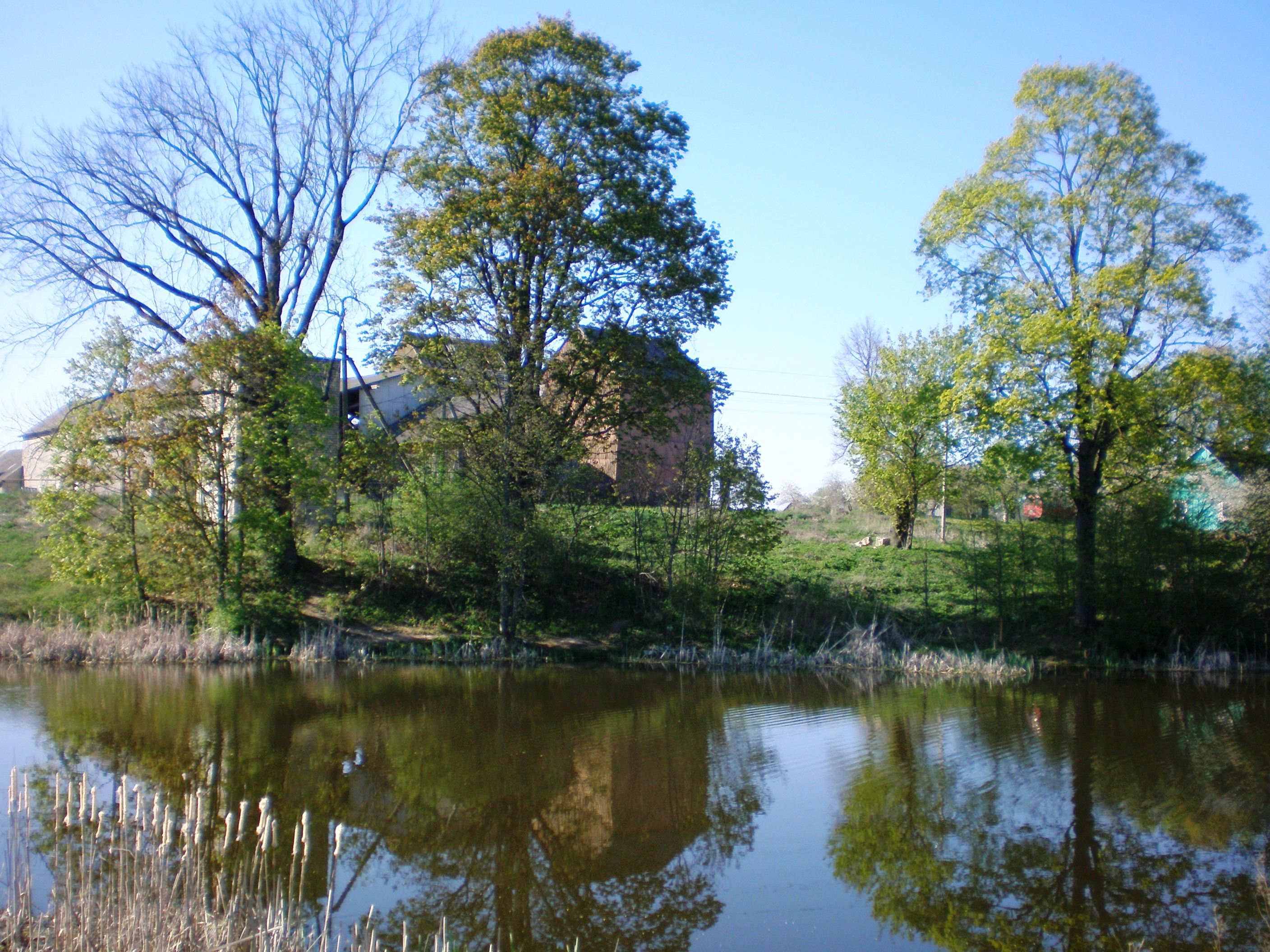 Serbinai, Kėdainių raj.